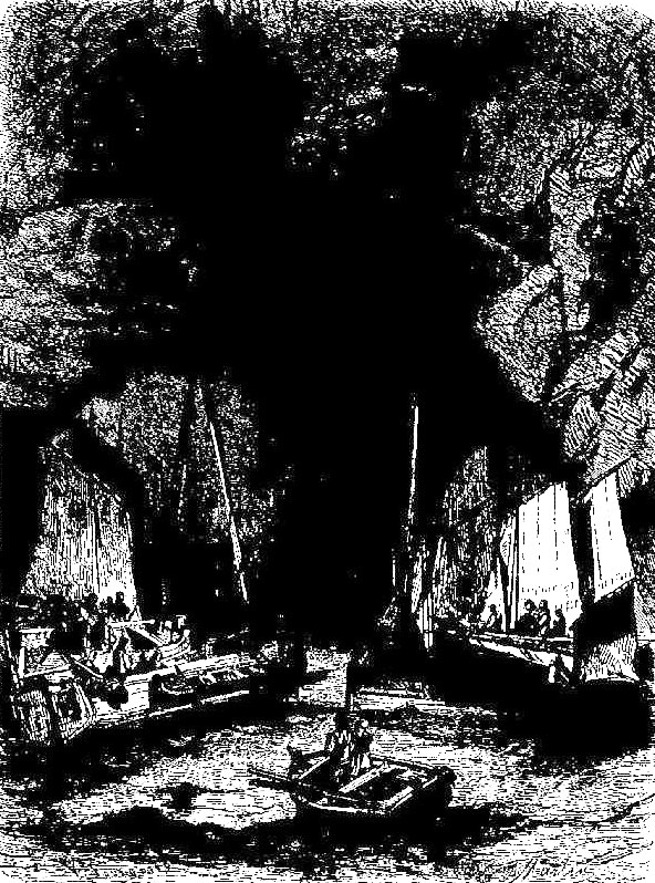 Visite des grottes de Morgat en voiier